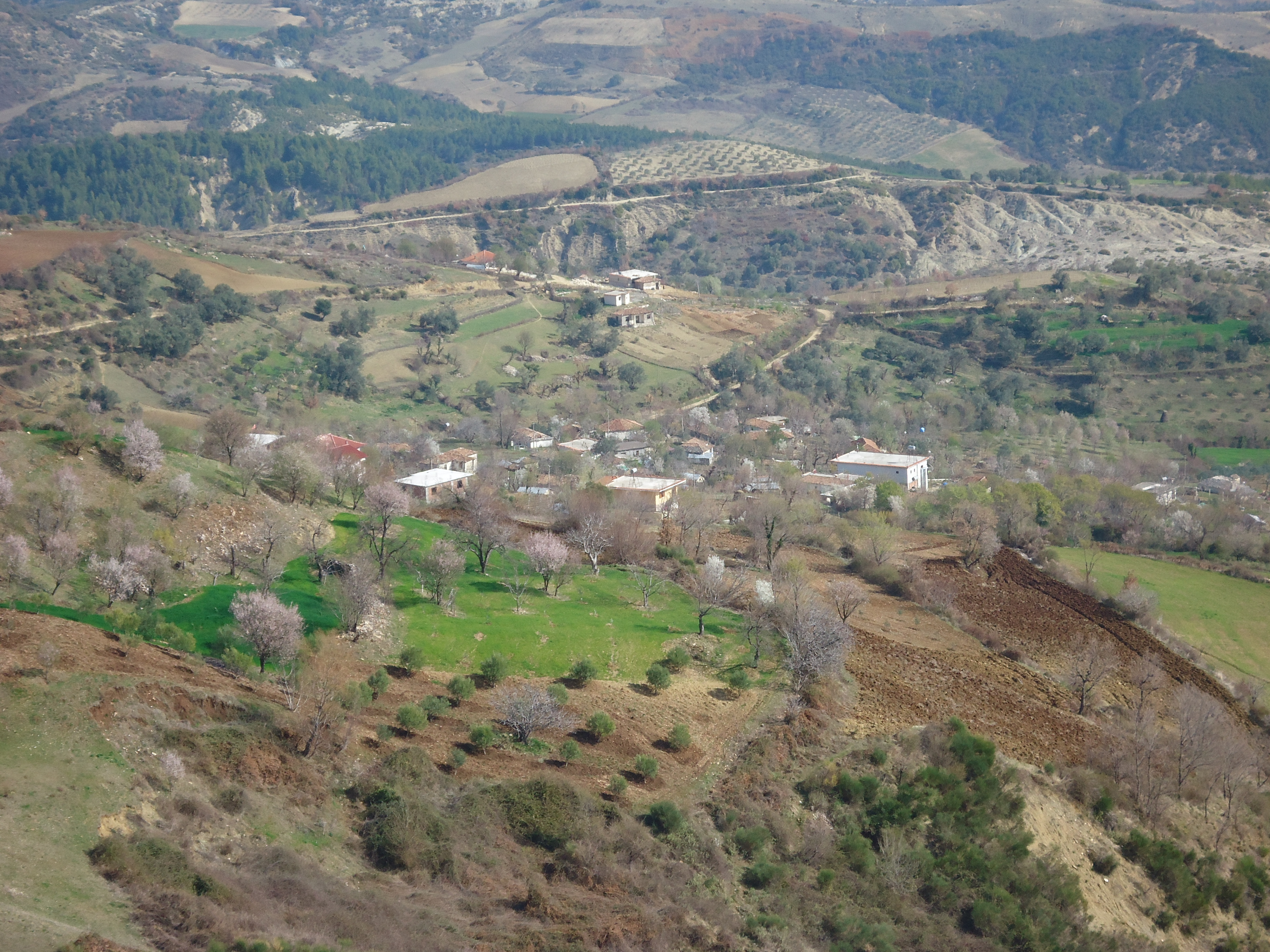 paftal,berat